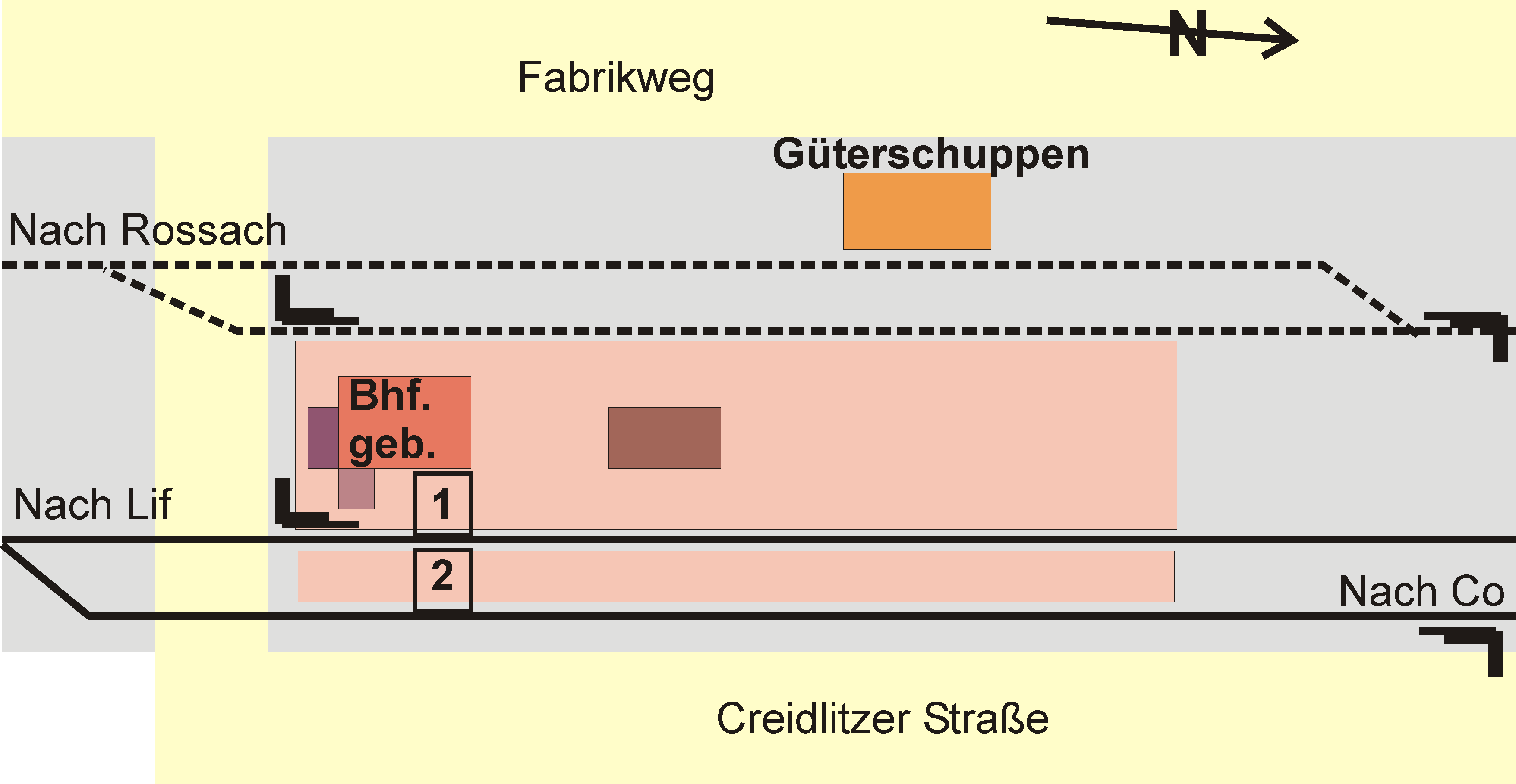 Bahnhof Coburg-Creidlitz, Gleisplan